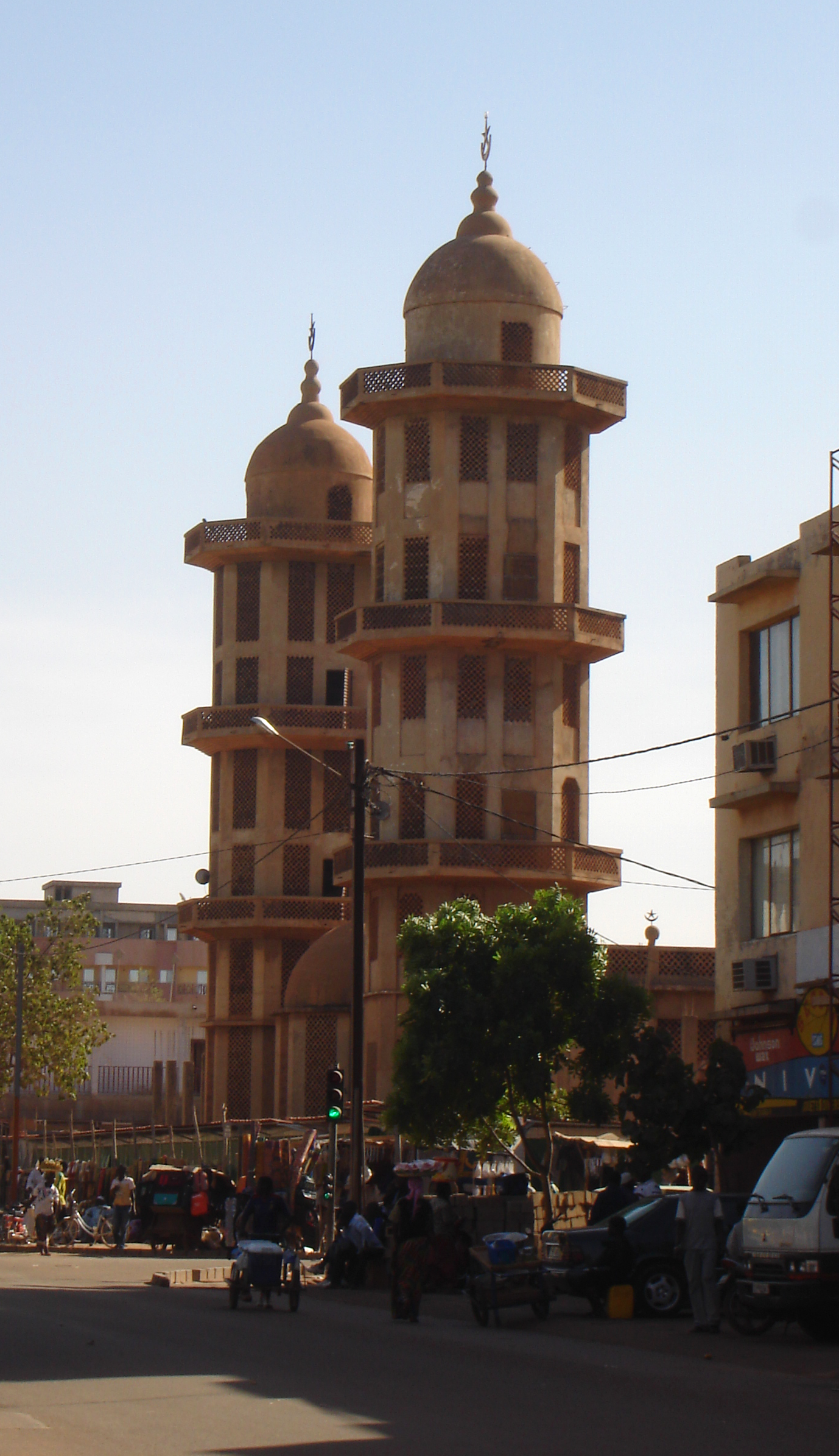 Burkina Faso: Grande Mosquée of Ouagadougou